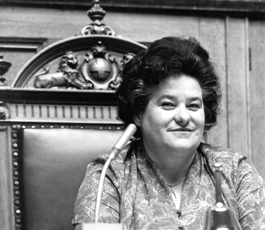 Hedi Lang, Schweizer Politikerin, auf dem Foto als Nationalratspräsidentin (1981/82) mit der Glocke vor sich